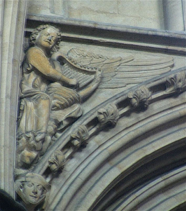 Engelrelieff fra Lincolnkatedralen